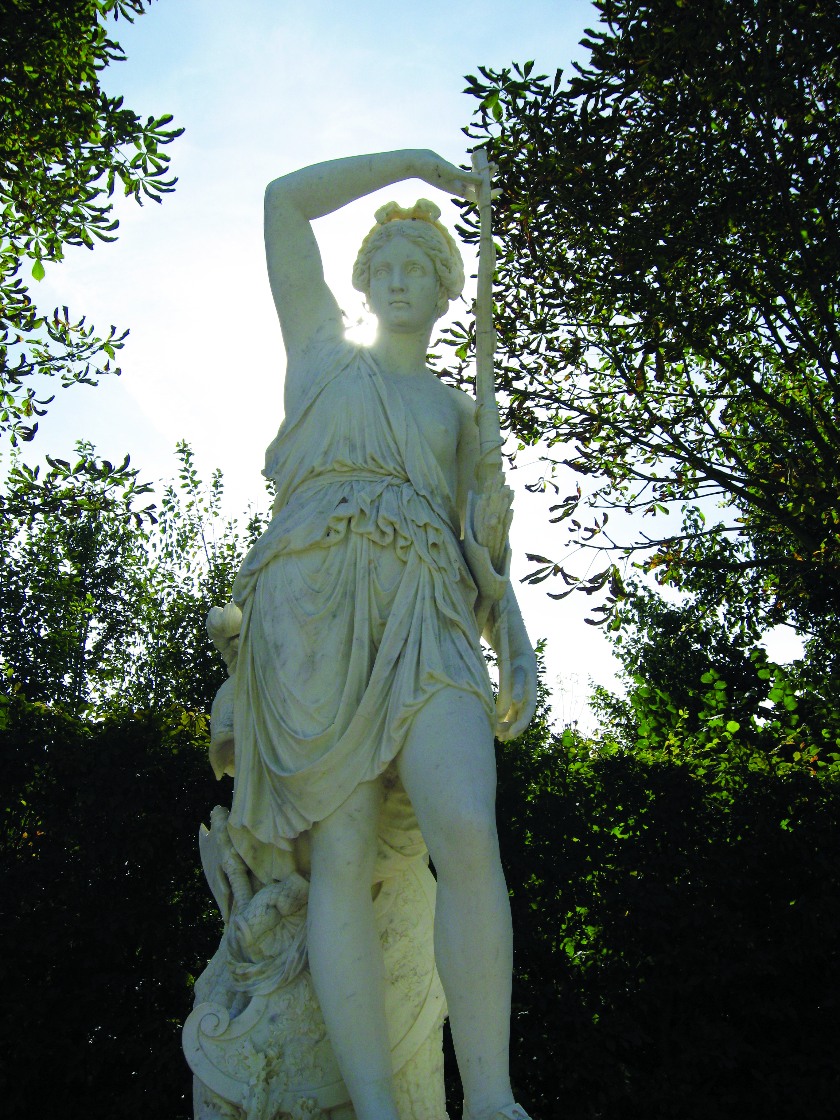 “Amazonka”(1685-1693, müəllif Jak Buirret)